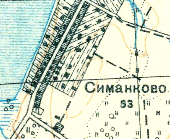 Топографическая карта Ленинградской области, квадрат О-36-25-А-в (Пос. Дивенский), деревня Симанково